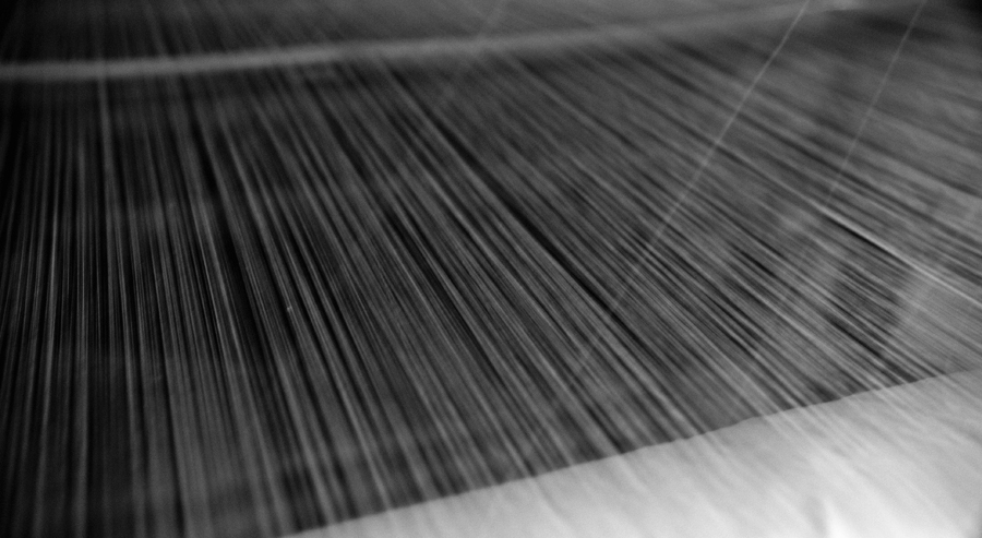 Lụa dệt ở làng Vạn Phúc, Hà Đông, Hà Nội, Việt Nam - Silk manufacturing in Hanoi